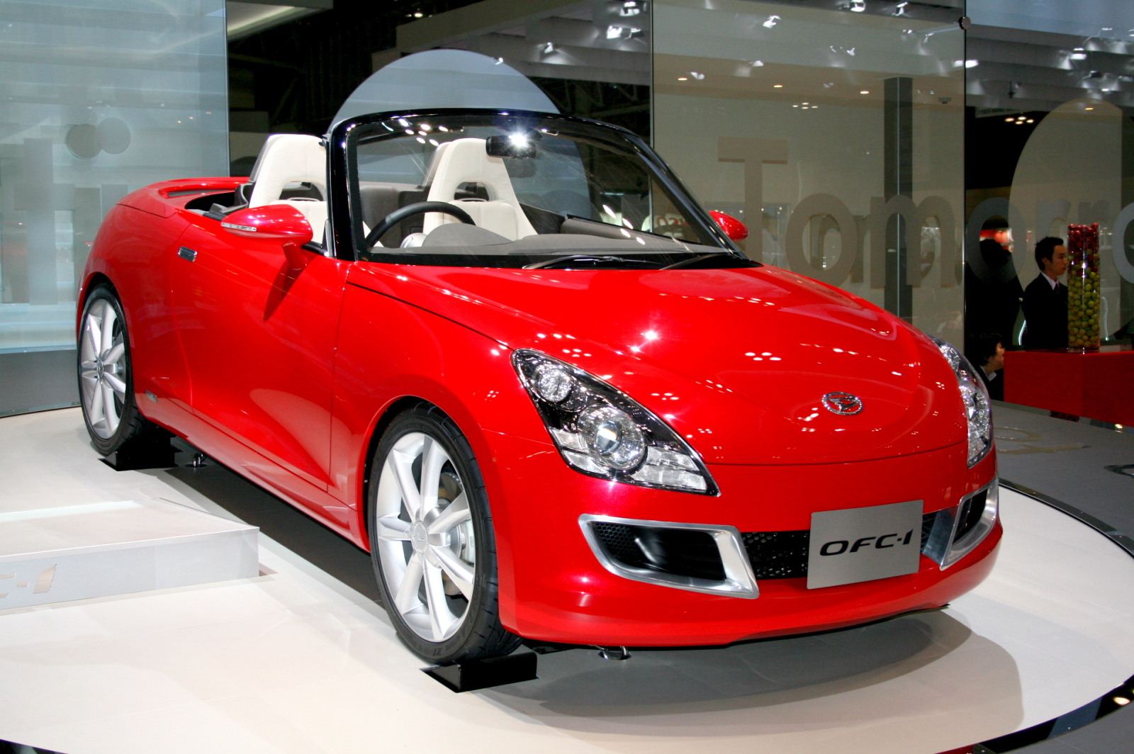 Daihatsu OFC-1